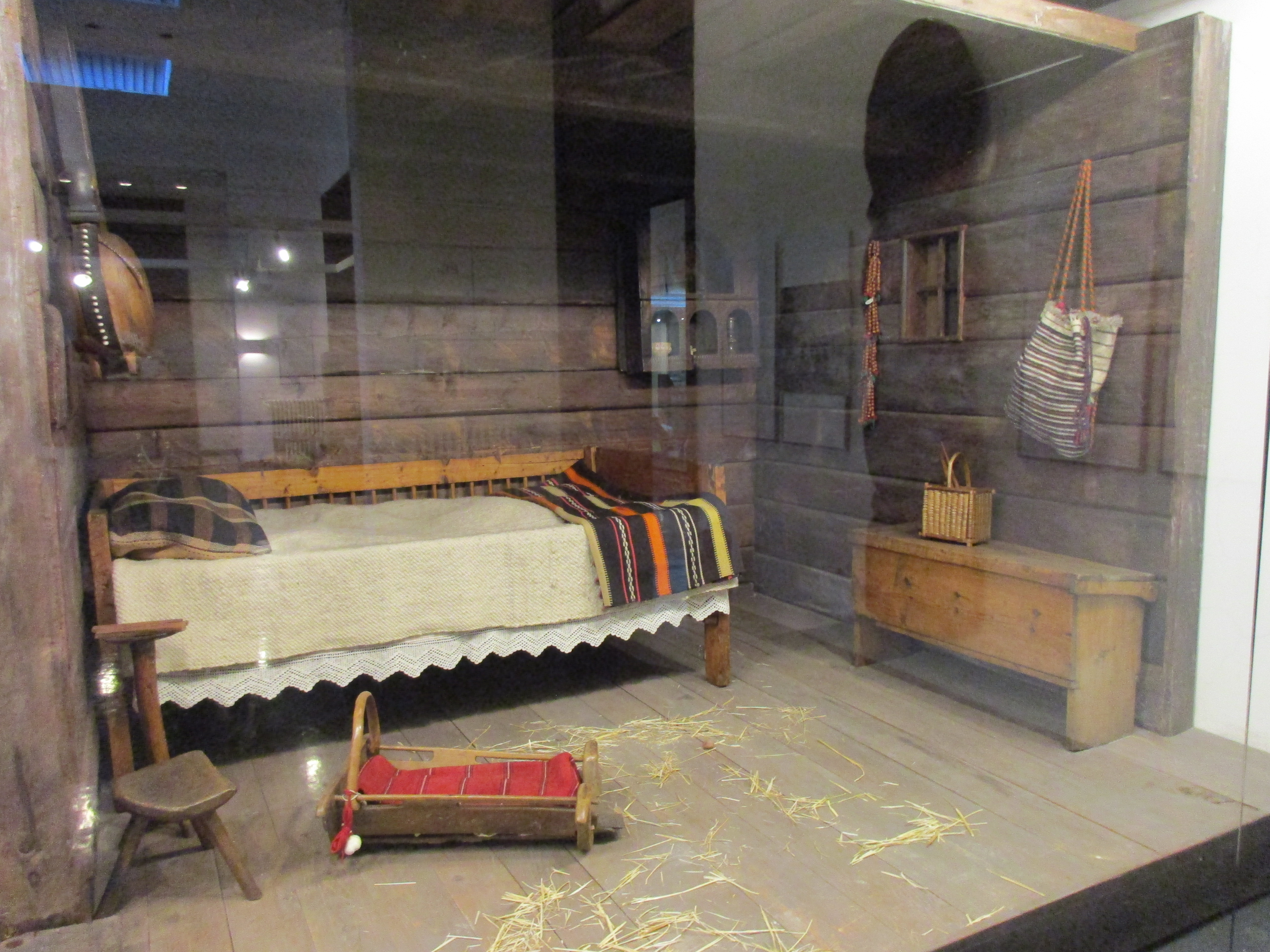 Srpski (latinica): Etnografski muzej, Beograd